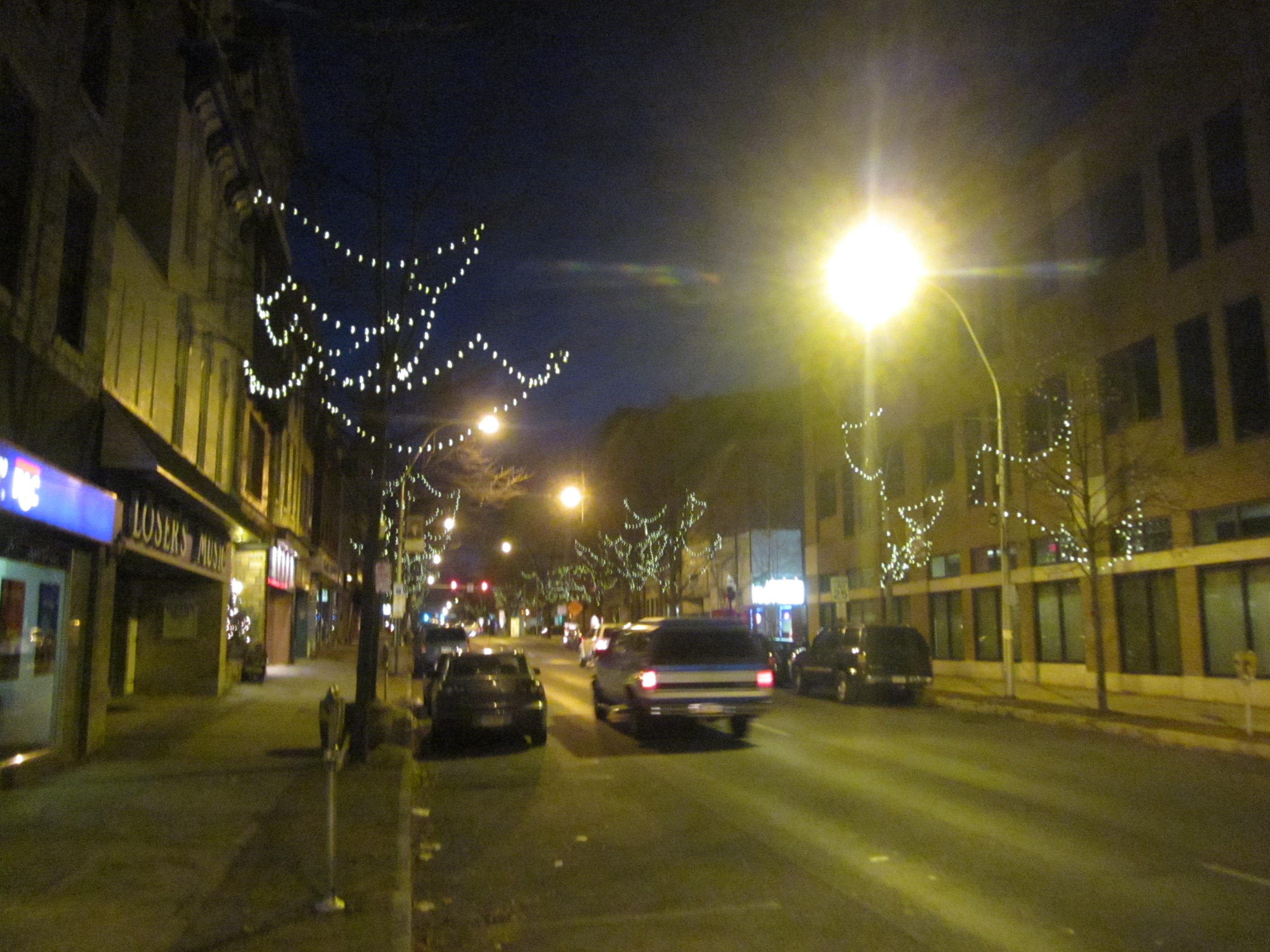 Lebanon, Pennsylvania